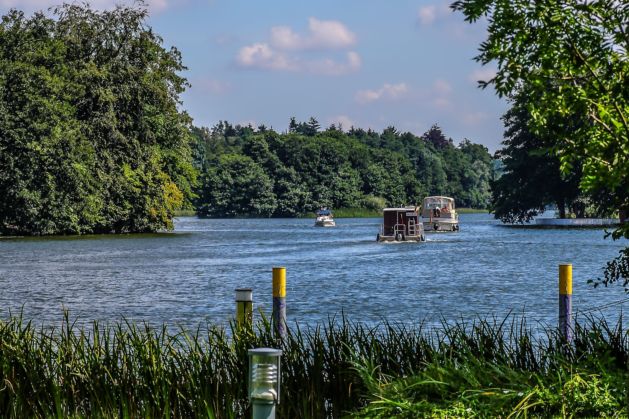 Templiner See